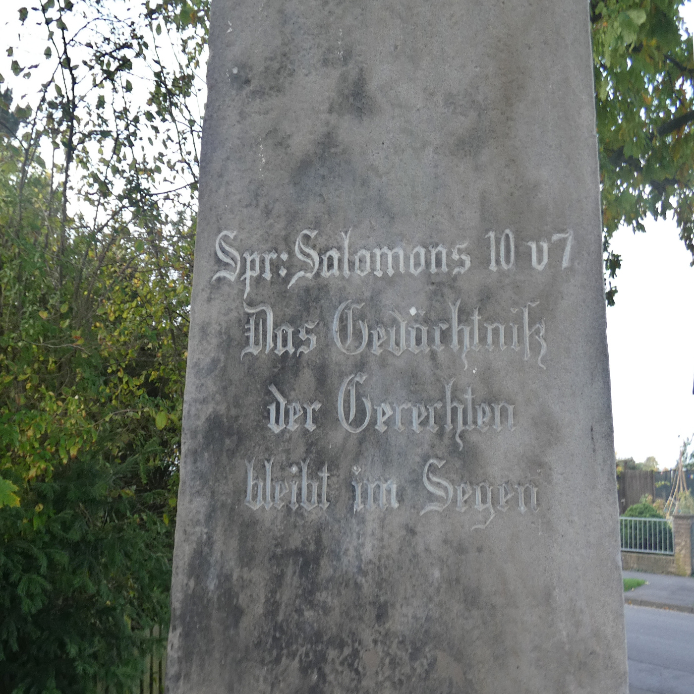 Das 1850 bei Linderte aufgestellte Amtmann-Reinecke-Denkmal ist ein Obelisk aus Wealdensandstein. Detail: Die Inschrift auf der linken Seite